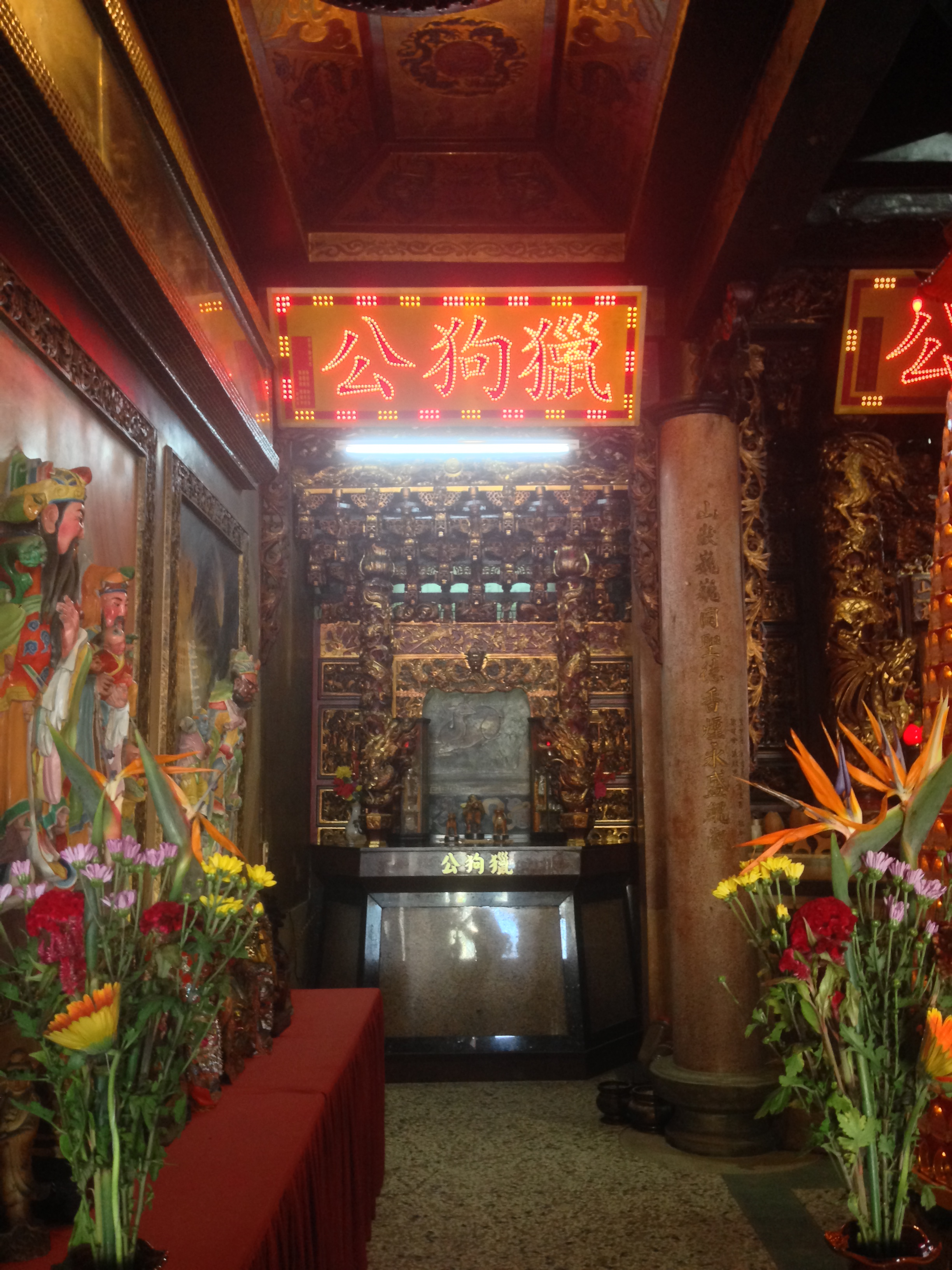 中文（台灣）: 圓山宮獵犬公